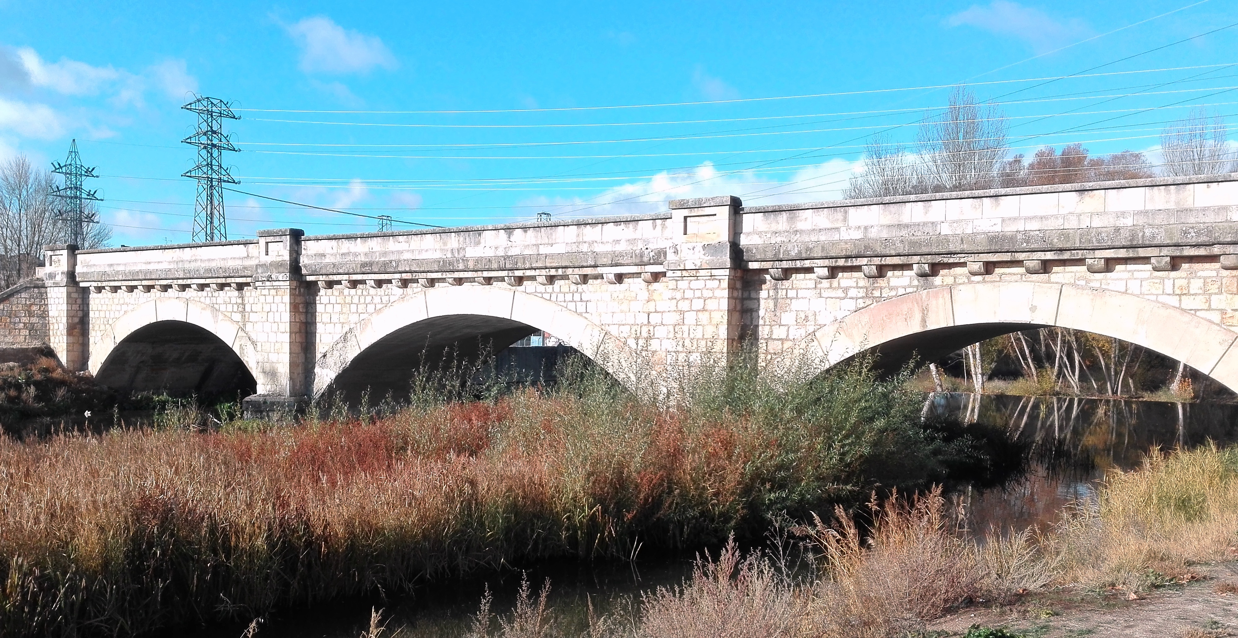 Es un puente de Burgos que cruza el río Arlanzón. Solía ser de uso ferroviario, pero tras la clausura de la línea, quedó en desuso.